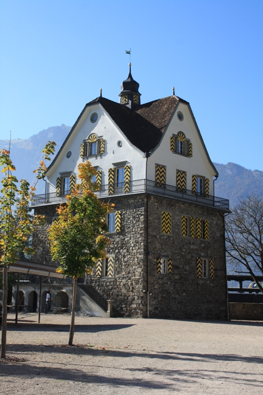 Schloss Rudenz in